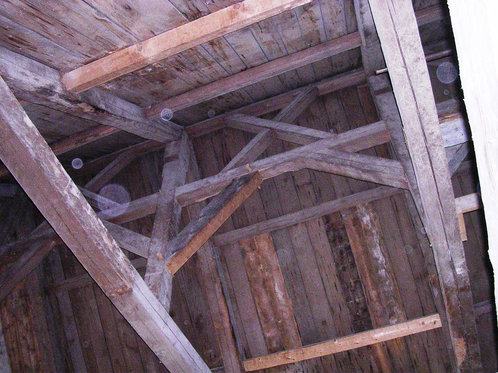 Croix de Saint-André au moulin de la Rémy à Baie-Saint-Paul (Québec); moulin à eau; moulin à farine; charpente